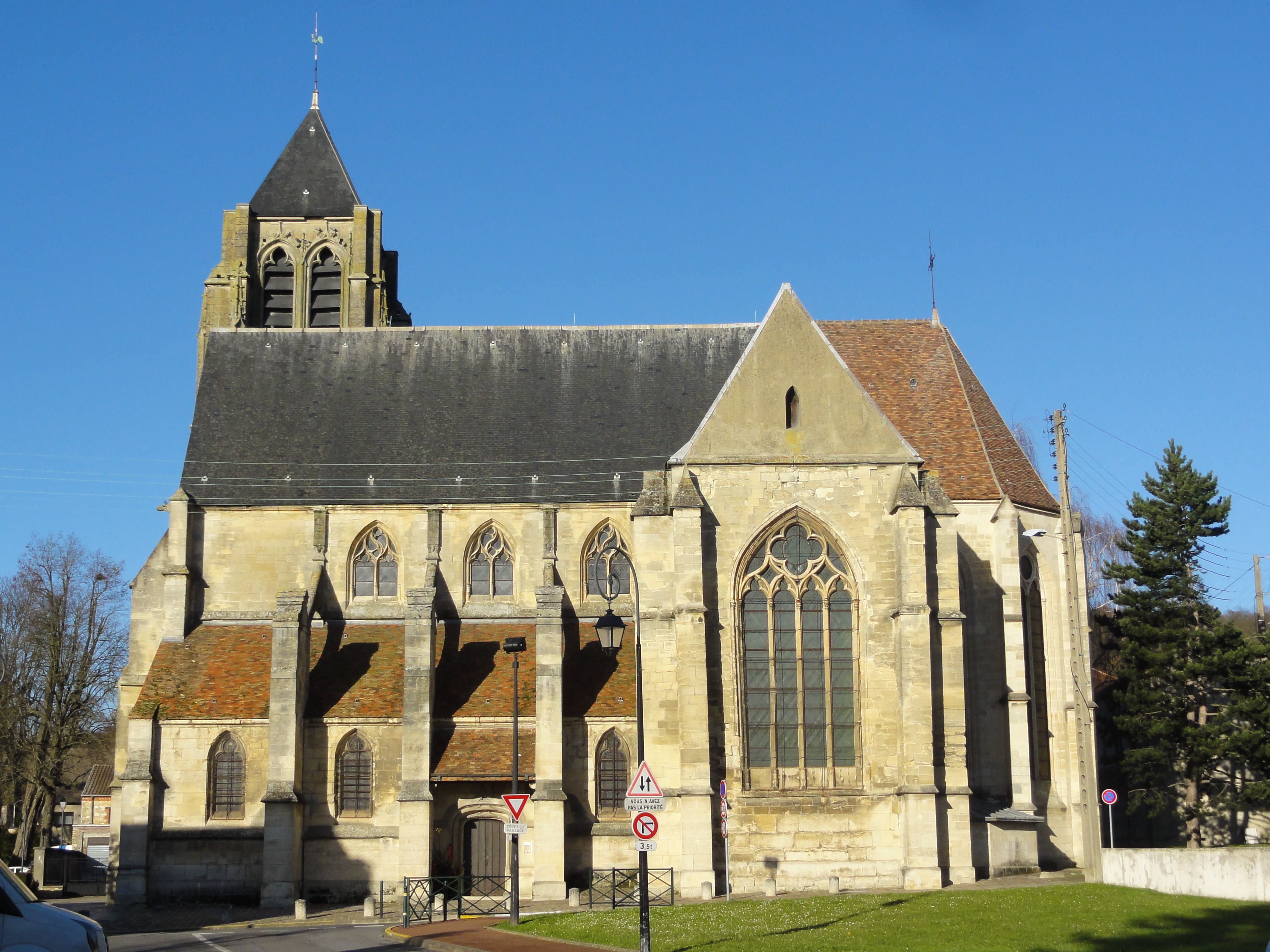 Elévation sud.